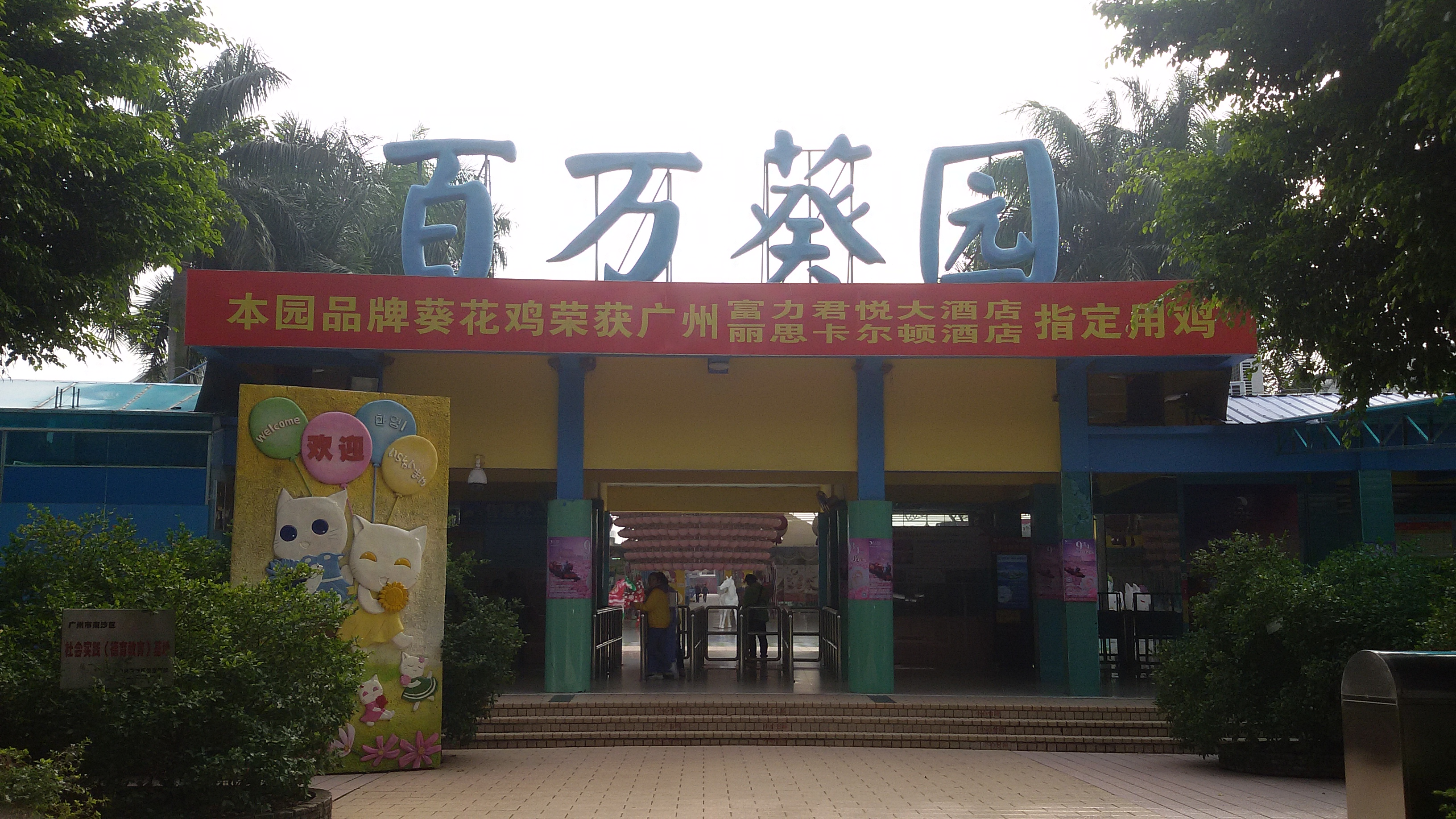 粵語: 百萬葵園正門